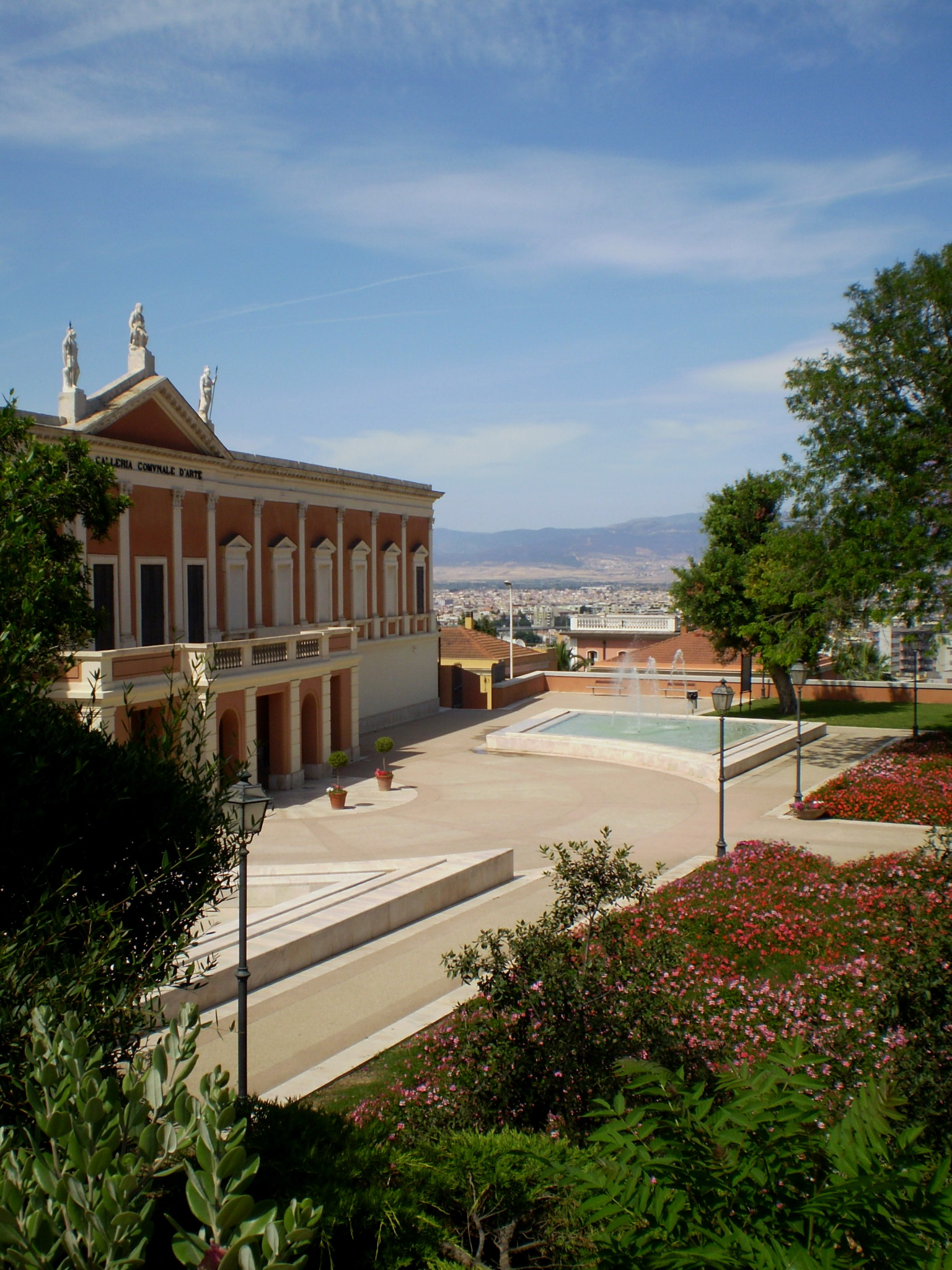 Galleria comunale d'arte